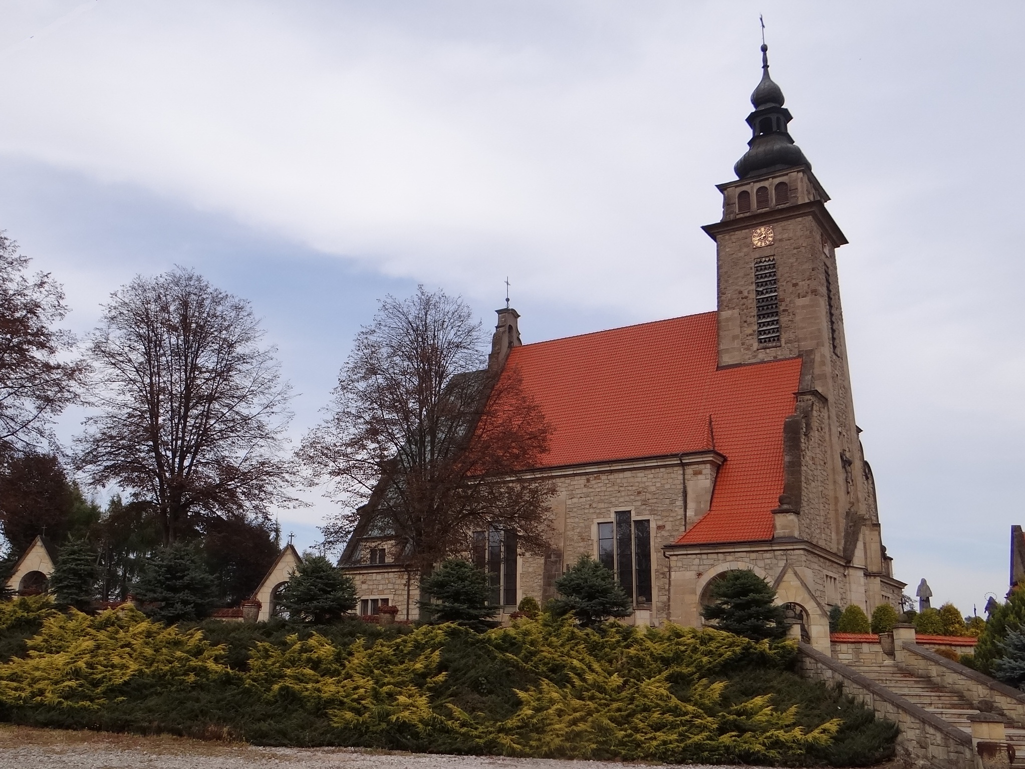 Kościół w Królówce